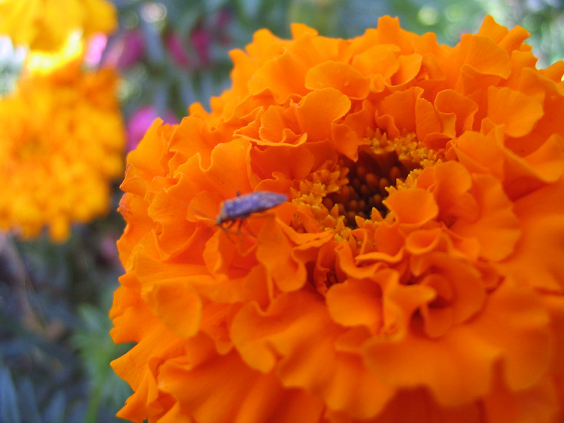 orange